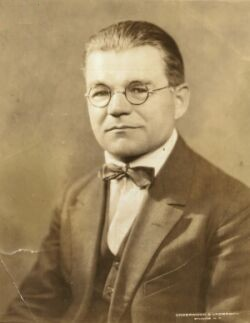 Norbert Fabián Čapek (1870 - 1942), Český náboženský myslitel, představitel unitářství.